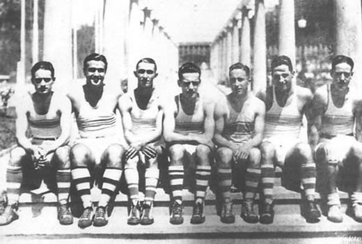 GELP 1924 - Primer Equipo de Basquetbol en la glorieta Estadio del Bosque